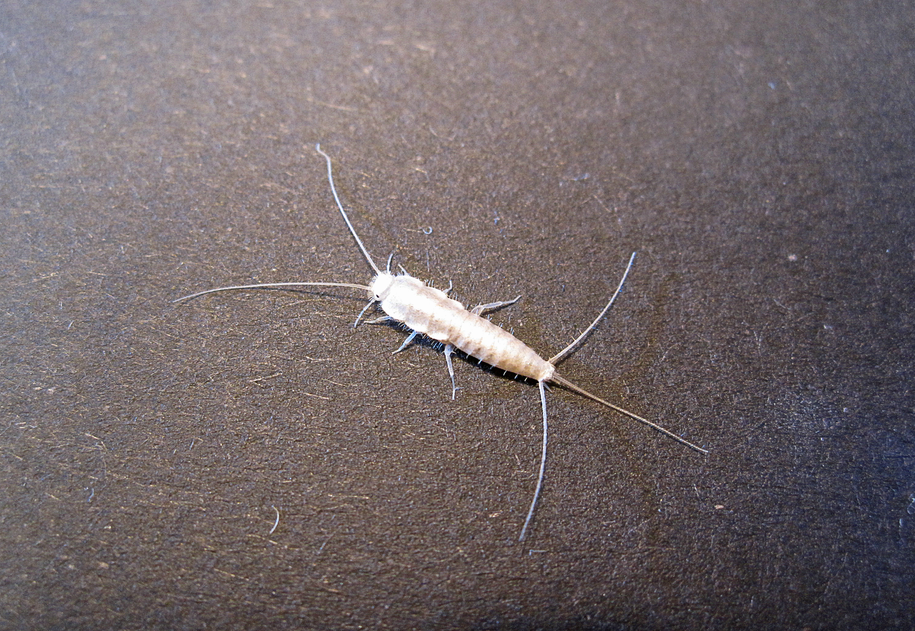 Das Geisterfischchen (Ctenolepisma calva) aus Chemnitz, Sachsen, Deutschland.